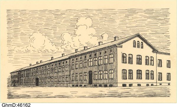 Arbets- och försörjningsinrättningen. Riven 1917. Drottningtorget; Stampgatan 2-6 Stadens 12 rote, nr 67 A